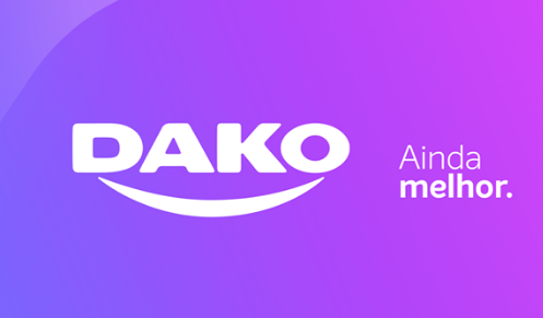 Logotipo da Dako